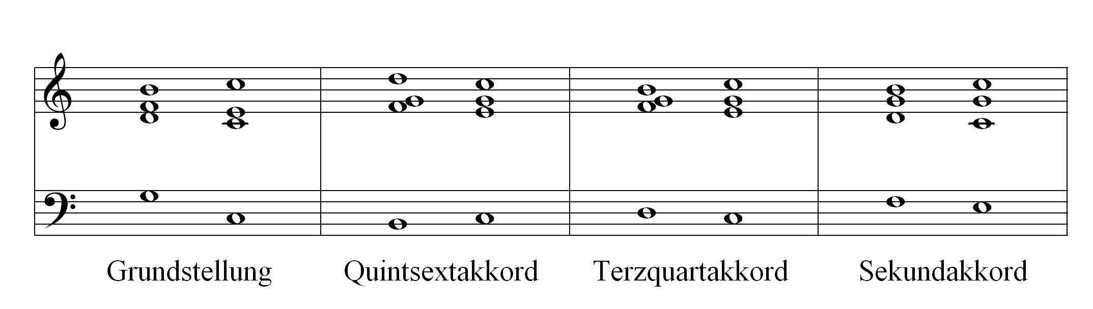 Die Grafik zeigt die Umkehrungen des Dominantseptakordes